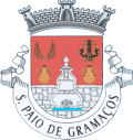 Coroa Mural: Coroa mural de prata de 3 torres. Esta coroa é obrigatória para todas as freguesias. (Vilas 4 torres e Cidades 5 torres). Escudo: Escudo a vermelho. Cor do Padroeiro de S. Paio de Gramaços que é S. Pelágio. Listel: Listel Branco, obrigatoriamente, com a legenda a negro do nome da freguesia - S. Paio de Gramaços. Palma e Lira: Duas Palmas de ouro folhadas, com os pés passados em aspa e uma lira de ouro cordoada e realçada a negro. Representam o gosto pelo desporto, pela cultura e pela instrução; sendo também uma homenagem a alguns beneméritos e cidadãos anónimos que deram tudo pelo desenvolvimento de desporto, da cultura e da instrução da nossa freguesia. Cântaras de Cobre: Duas cântaras de cobre. Mostram um dos artesanatos mais representativos da nossa freguesia no País inteiro; sendo também uma homenagem a todos os empresários, dos mais variados ramos, que geram riqueza para a nossa região e para o nosso País. Fonte: Fontenário de Nossa Senhora dos Milagres. Representa um monumento da nossa Freguesia e é, acima de tudo, uma homenagem a Nossa Senhora, venerada por todos os Sampaenses e Catraenses. A lista azul realça a qualidade das nossas águas e é também a cor de Nossa Senhora.